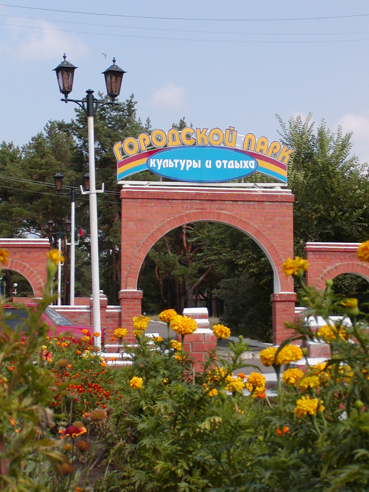 Парк культуры и отдыха в Сосновом бору